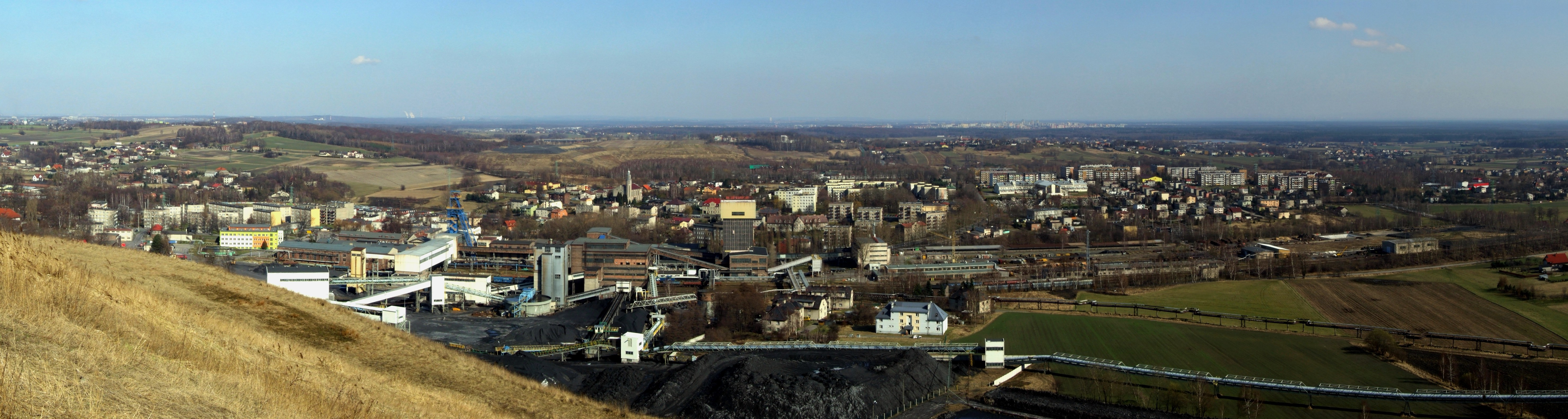 Łaziska Średnie, dzielnica Łazisk Górnych